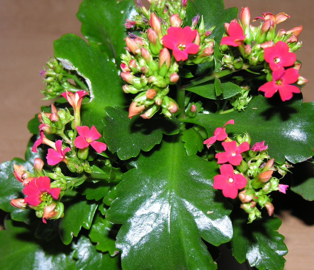 Raudonžiedė kalankė (Kalanchoe blossfeldiana) Šeima. Storlapiniai (Crassulaceae) Foto: Algirdas 2006 m. kovo 12 d. savo bute